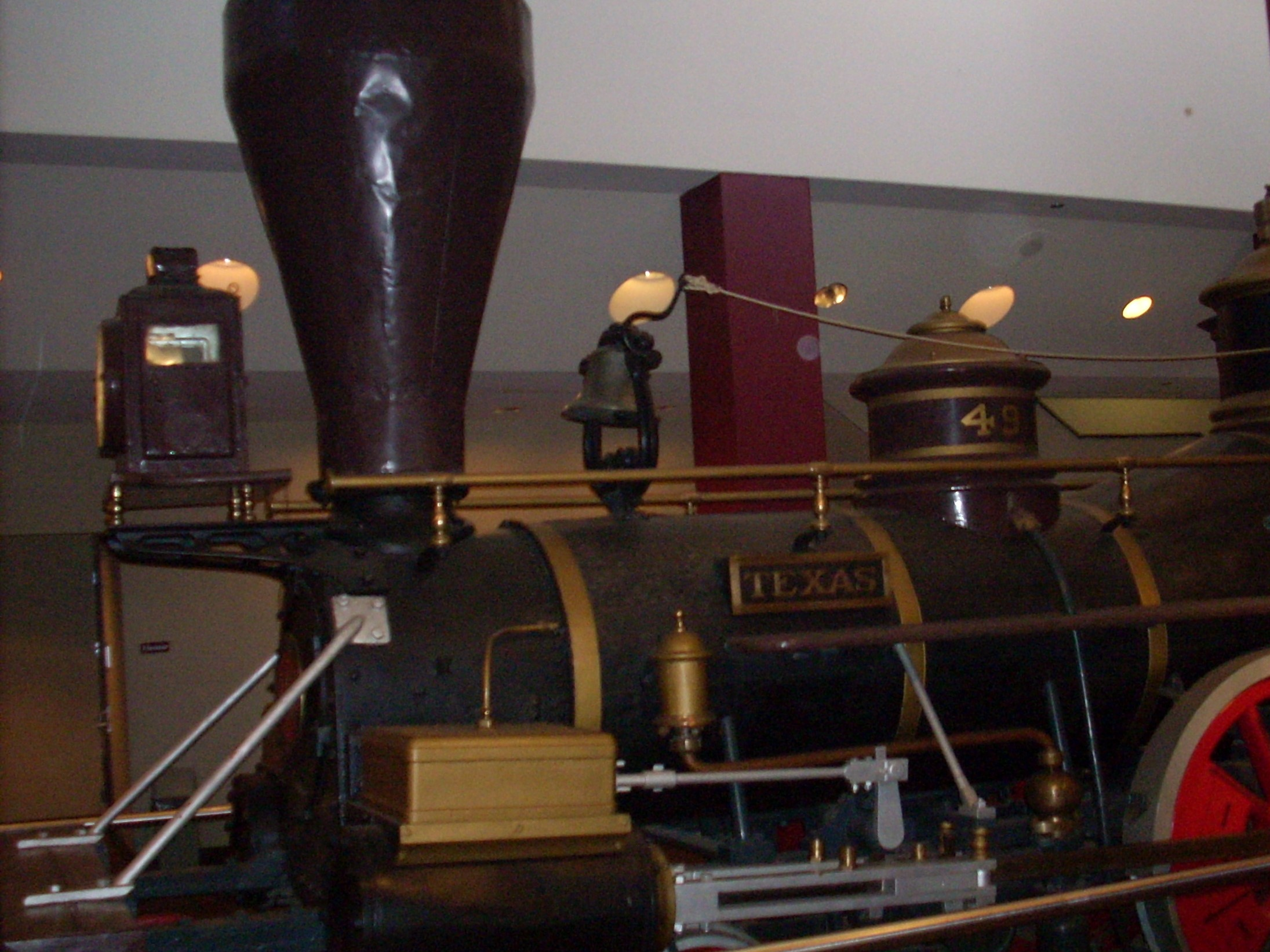 קטר המוצג בציקלורמה